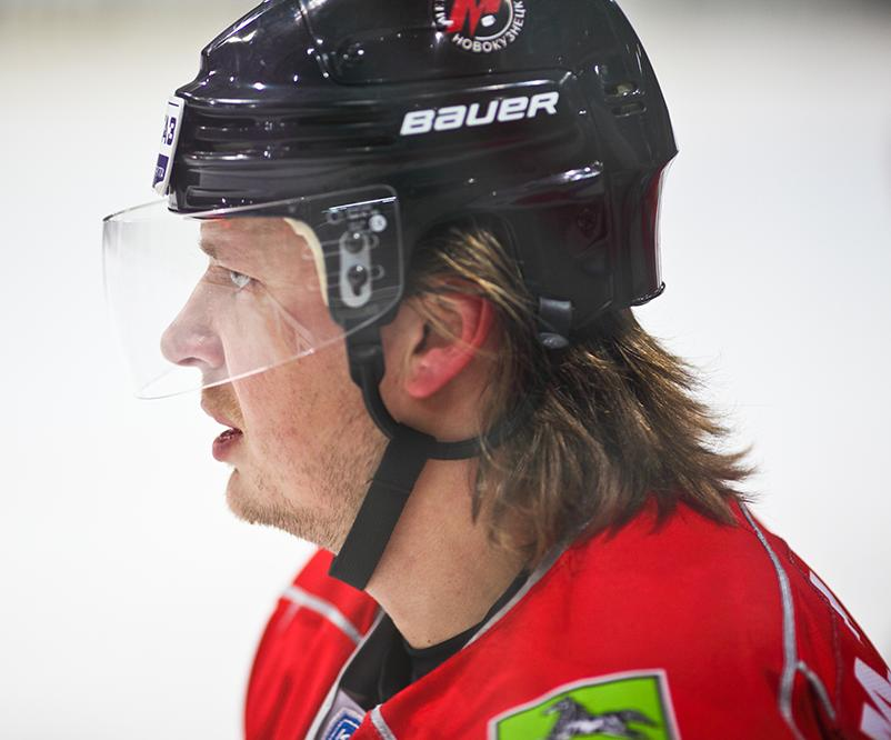 Защитник новокузнецкого «Металлурга» Филипп Метлюк во время матча чемпионата КХЛ против московского «Динамо» 21 декабря 2012 года.